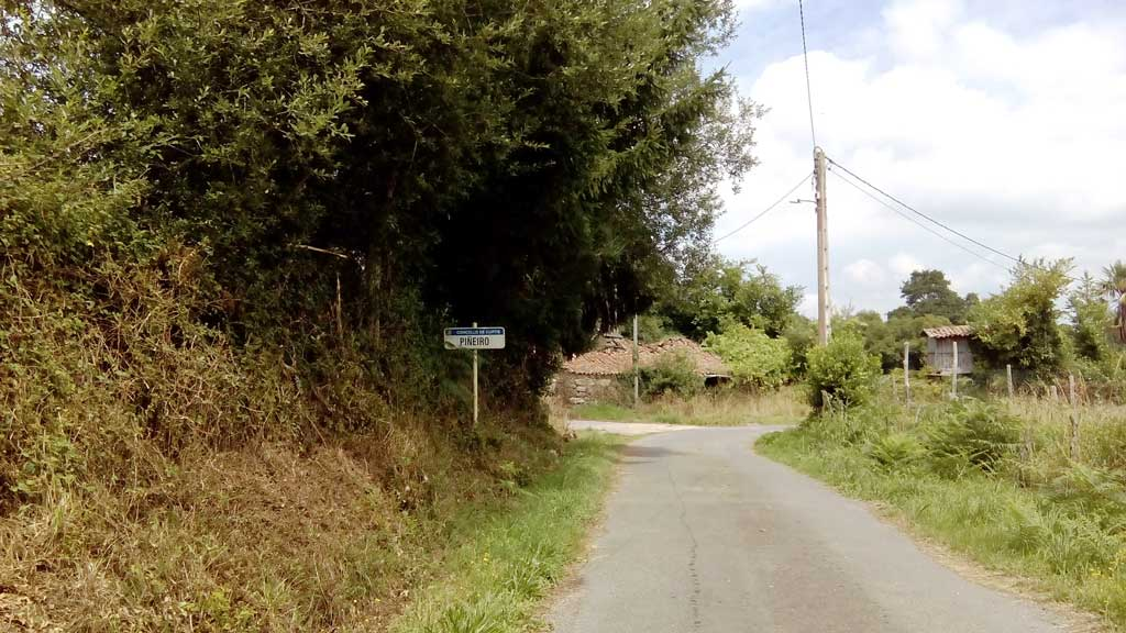 Vista de Piñeiro, Curtis.